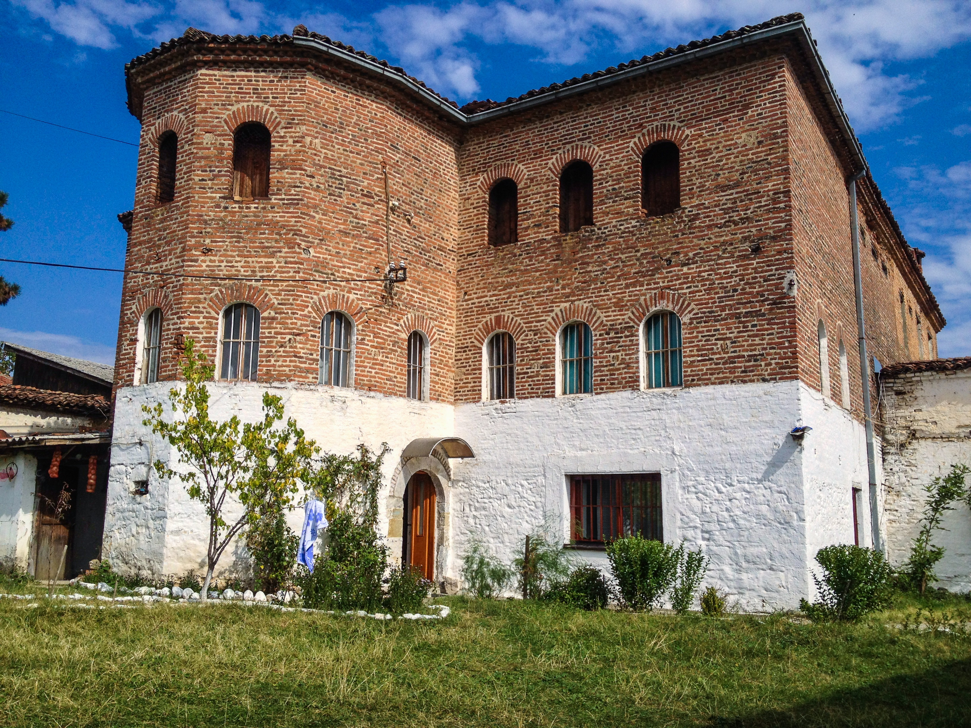 Kulla e Astrit Kryeziut